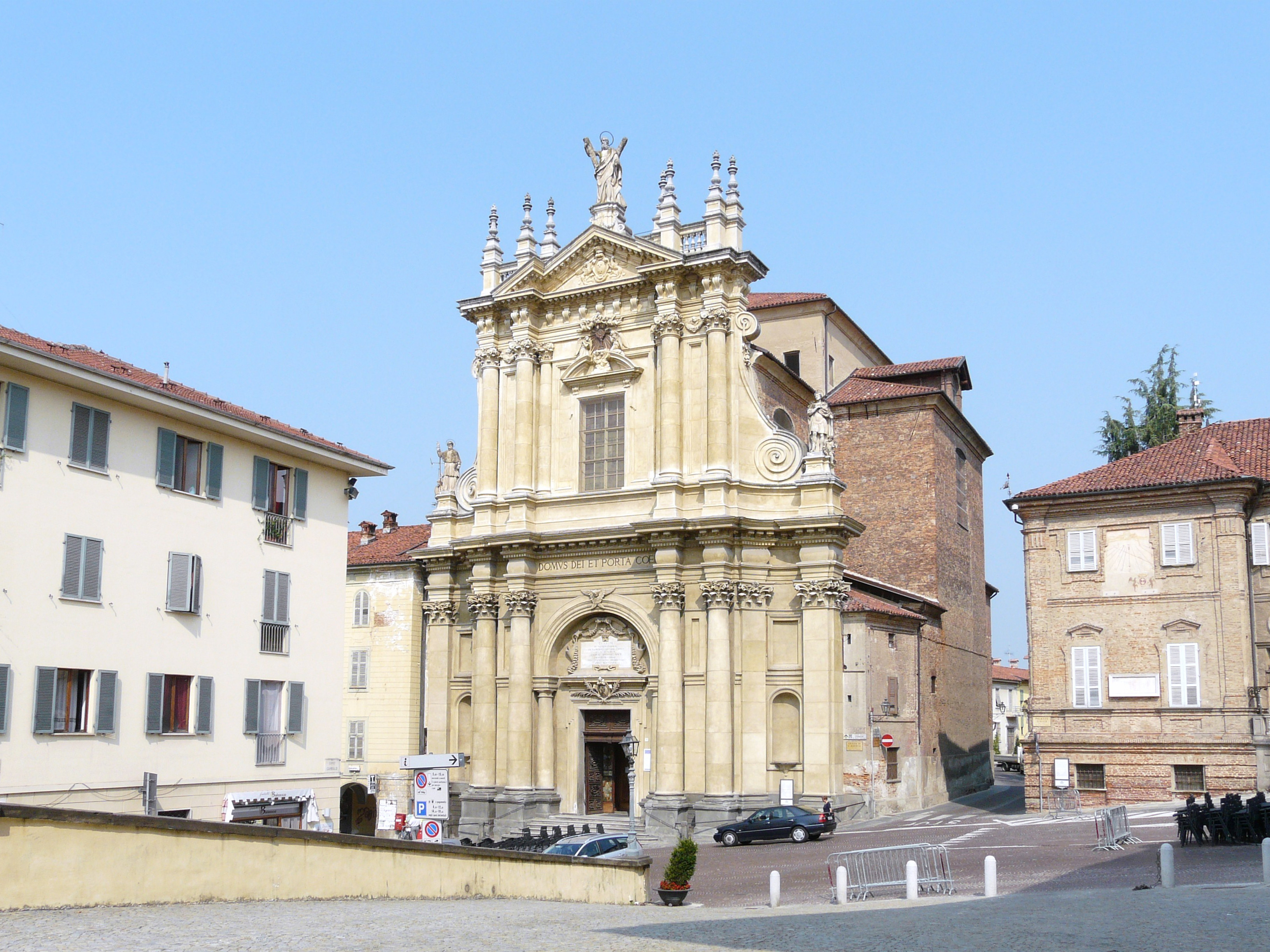 Chiesa di Sant'Andrea, Bra, Piemonte, Italia